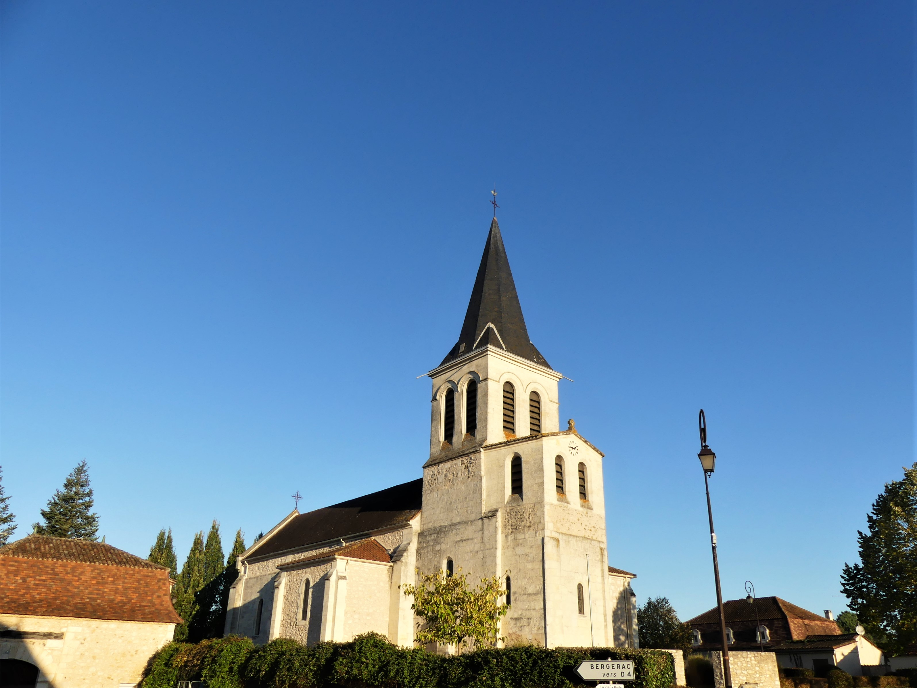 L'église de Maurens, Dordogne, France.